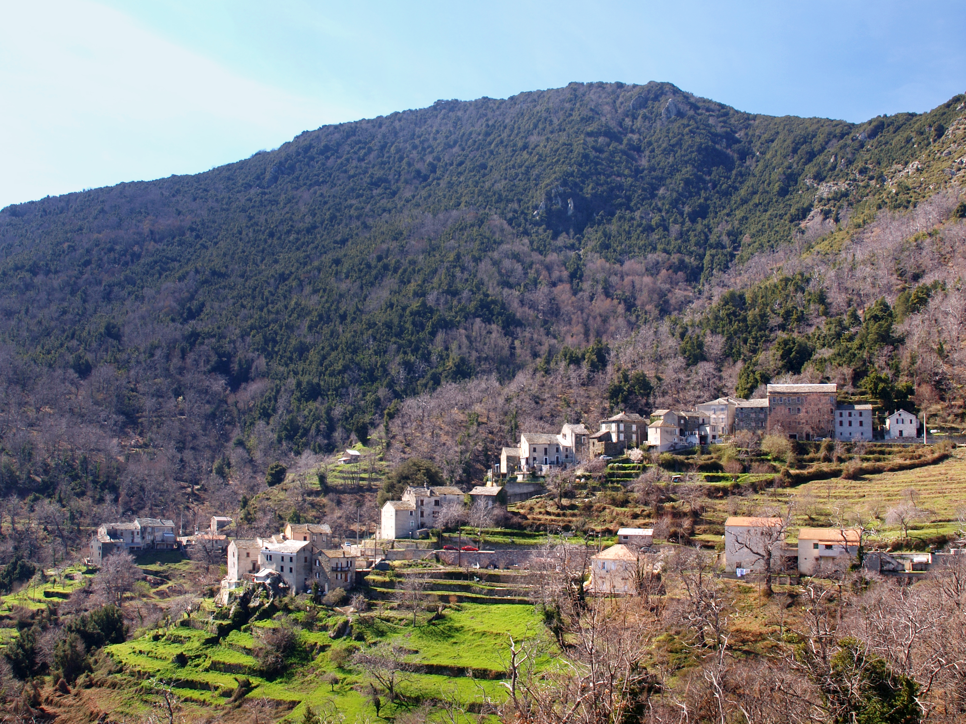 Corsu: Ortiporiu, Casacconi (Corsica) - Paisolu di Piazza